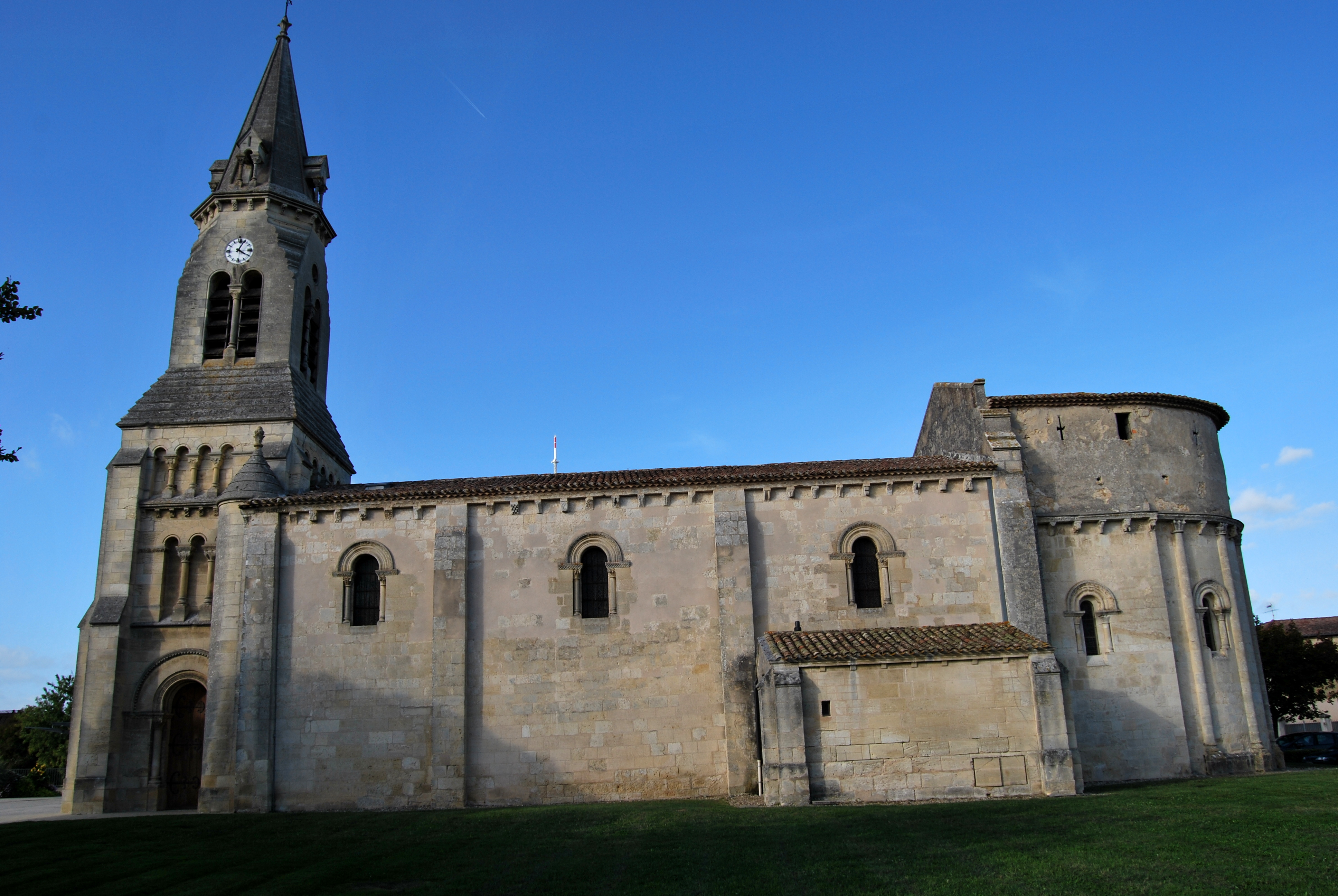 Église Saint-Siméon de Bouliac